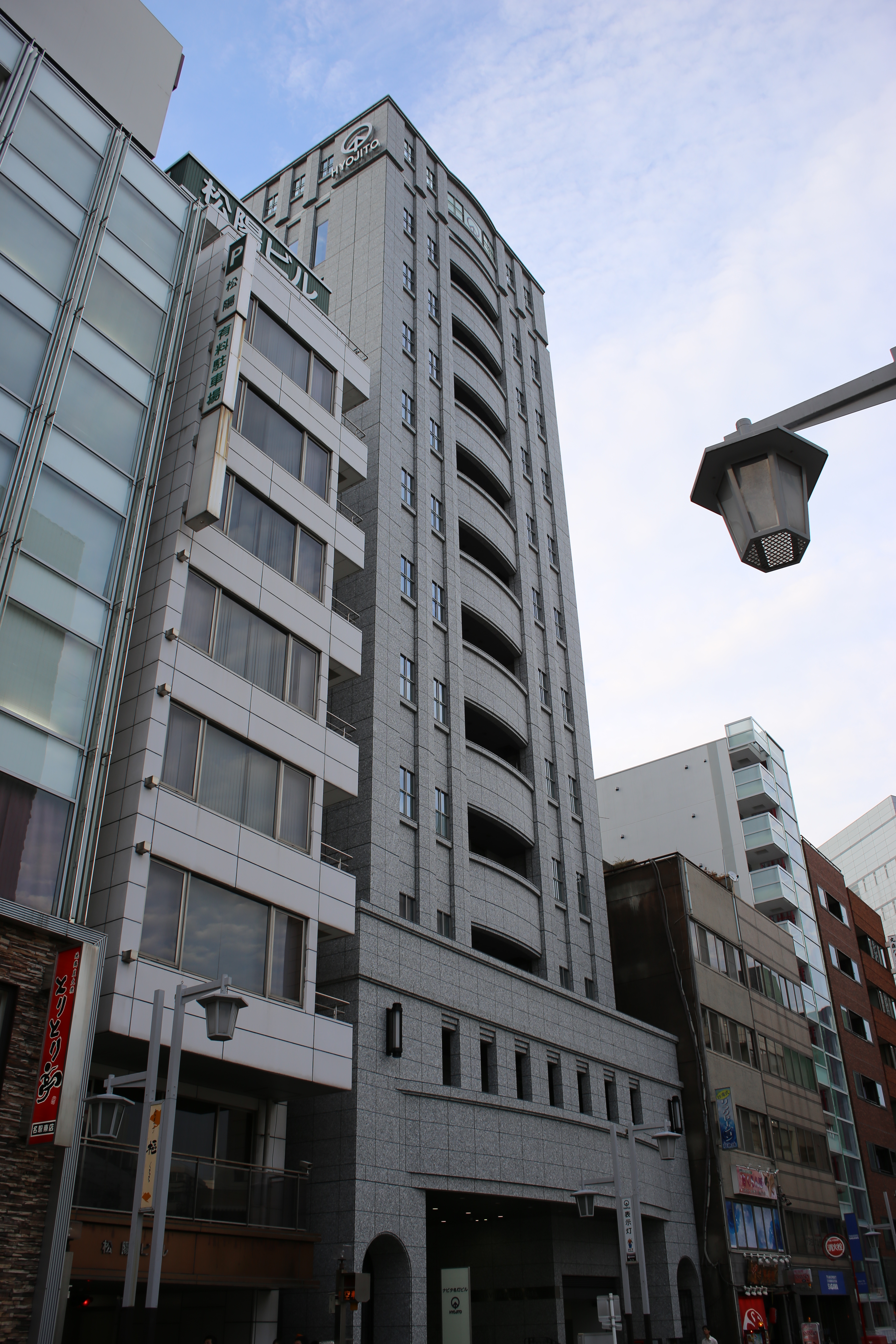 名古屋市中村区名駅四丁目のナビタ名灯ビルを南側公道西側より撮影